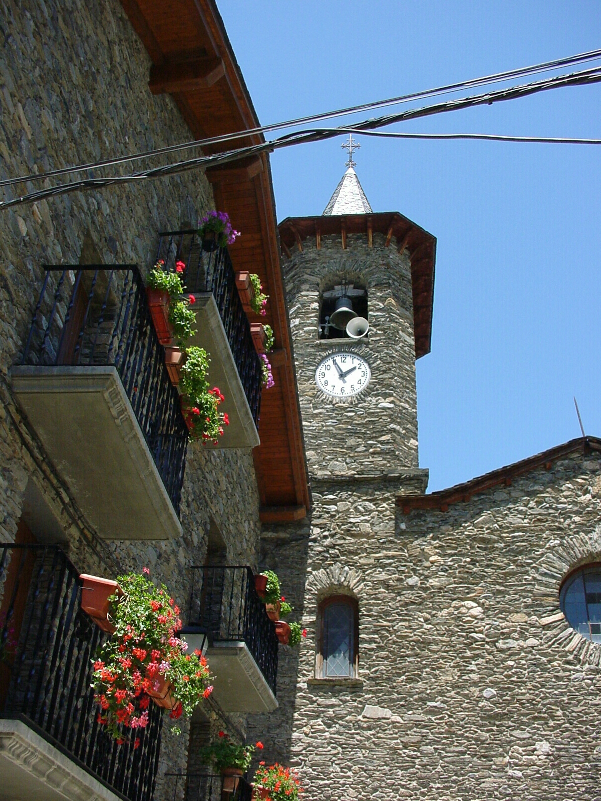 La Noguera Ansicht